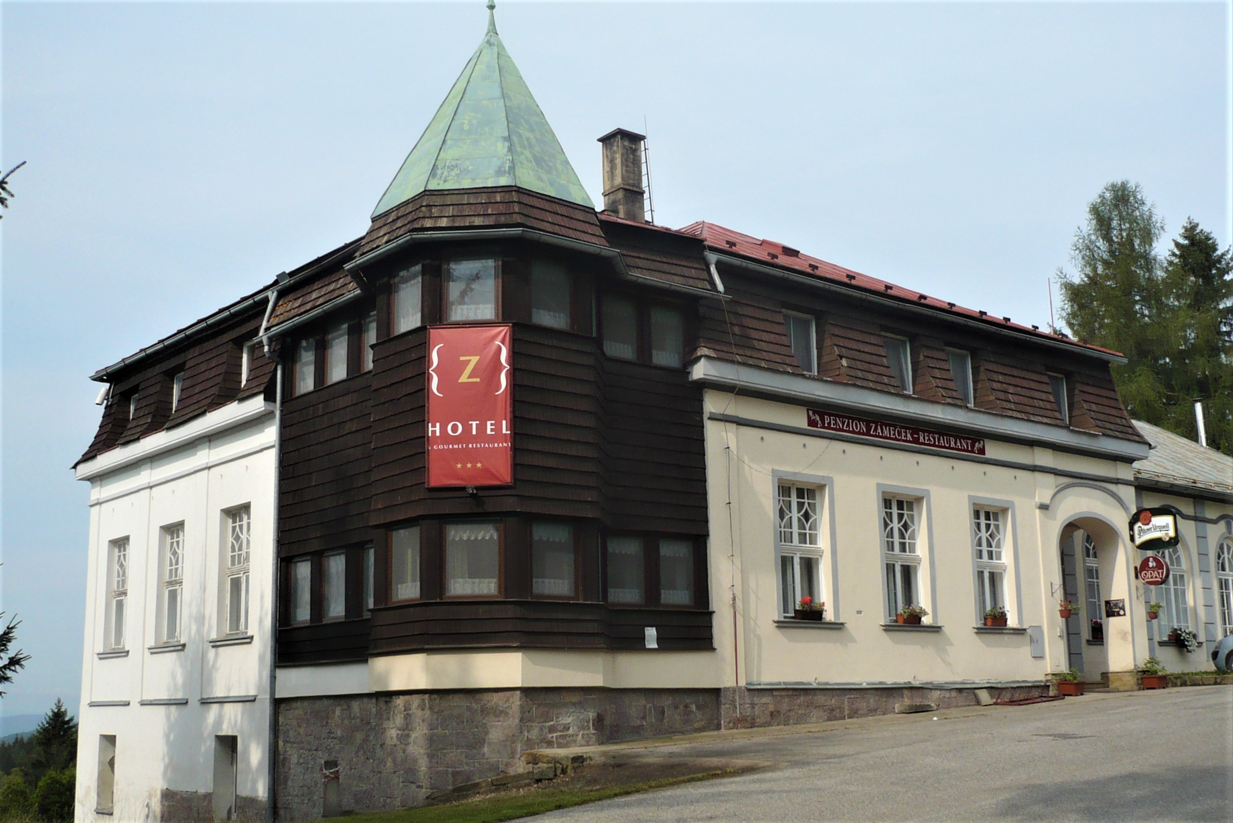 Janovicky. Zajazd Franza Birkego z 1916 r.